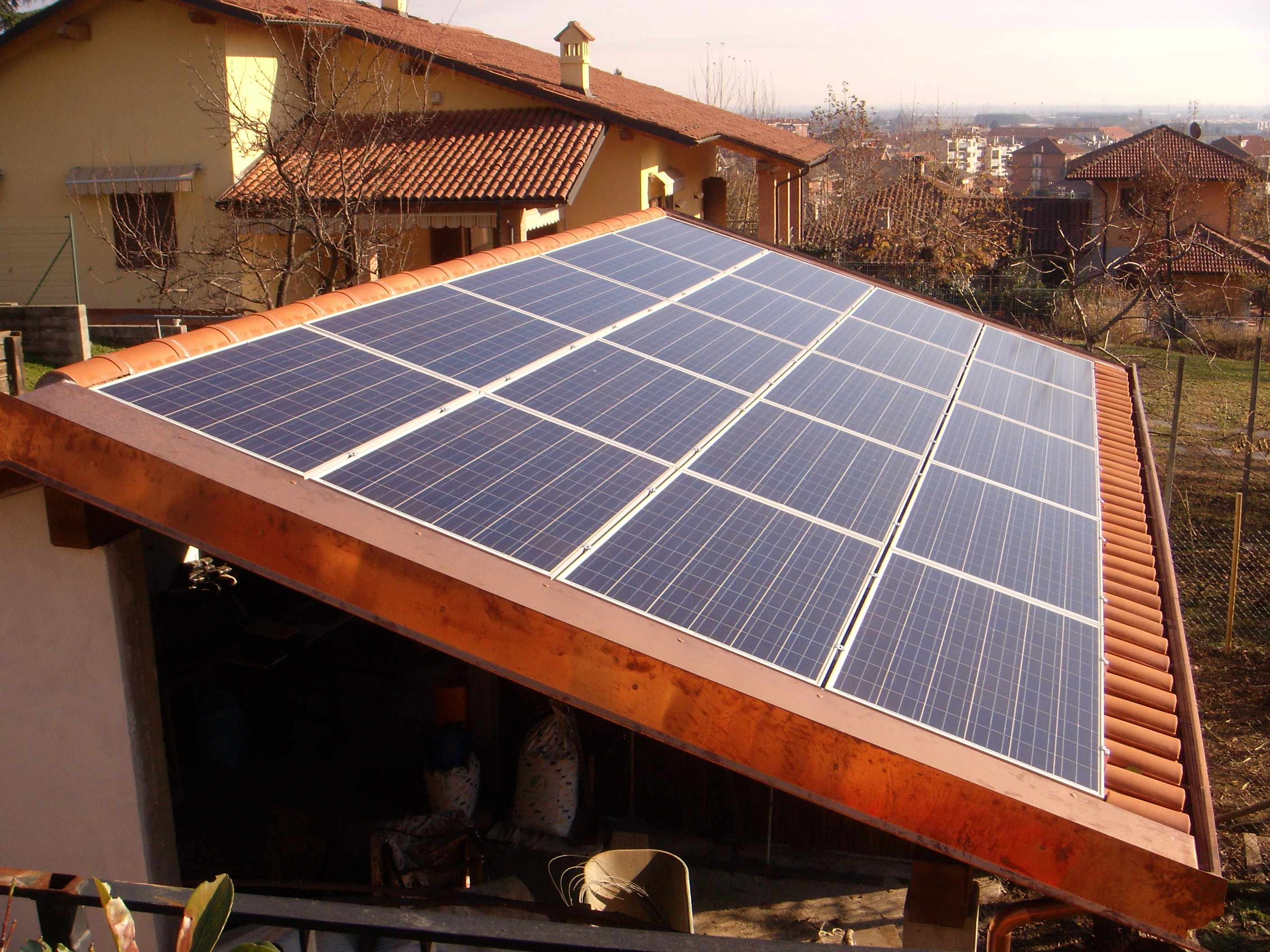 Impianto fotovoltaico integrato a Piossasco